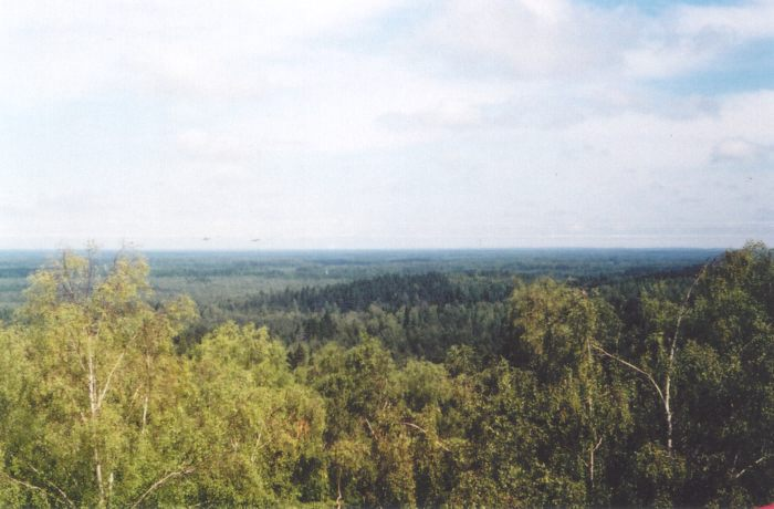 Vaade Valgehobusemäelt